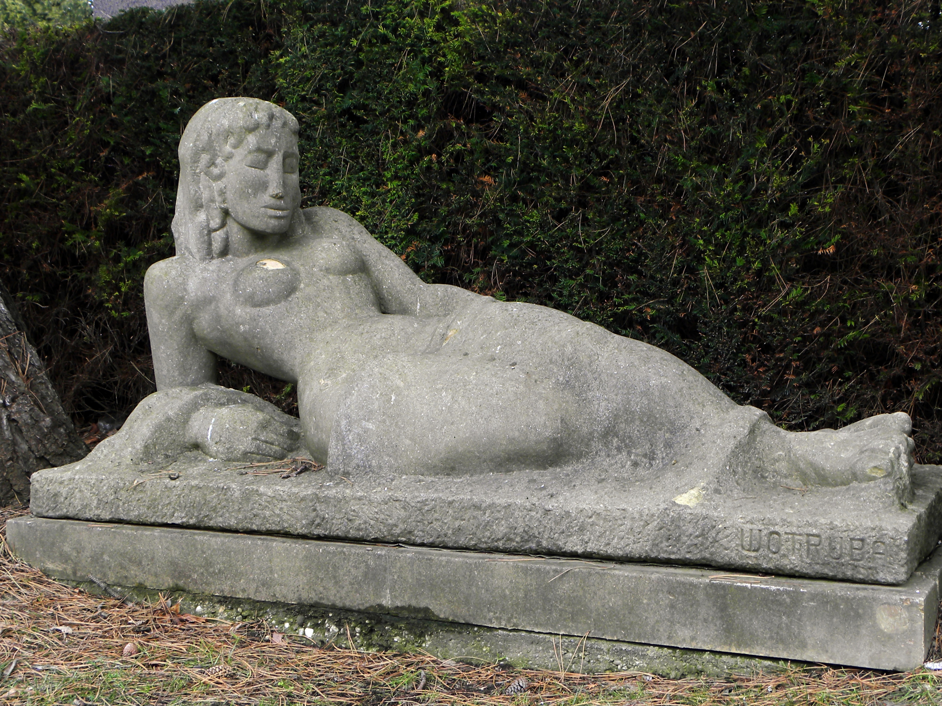 Einst umstrittene Figur am Grab der Opernsängerin Selma Halban Kurz von Fritz Wotruba.